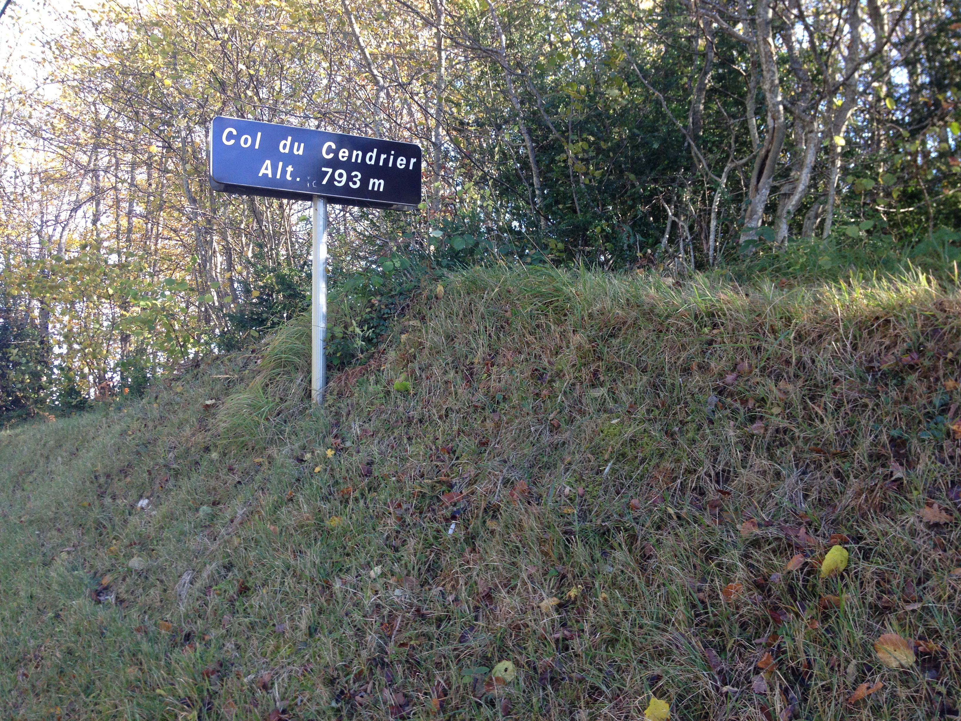 Col du Cendrier dans l'Ain.